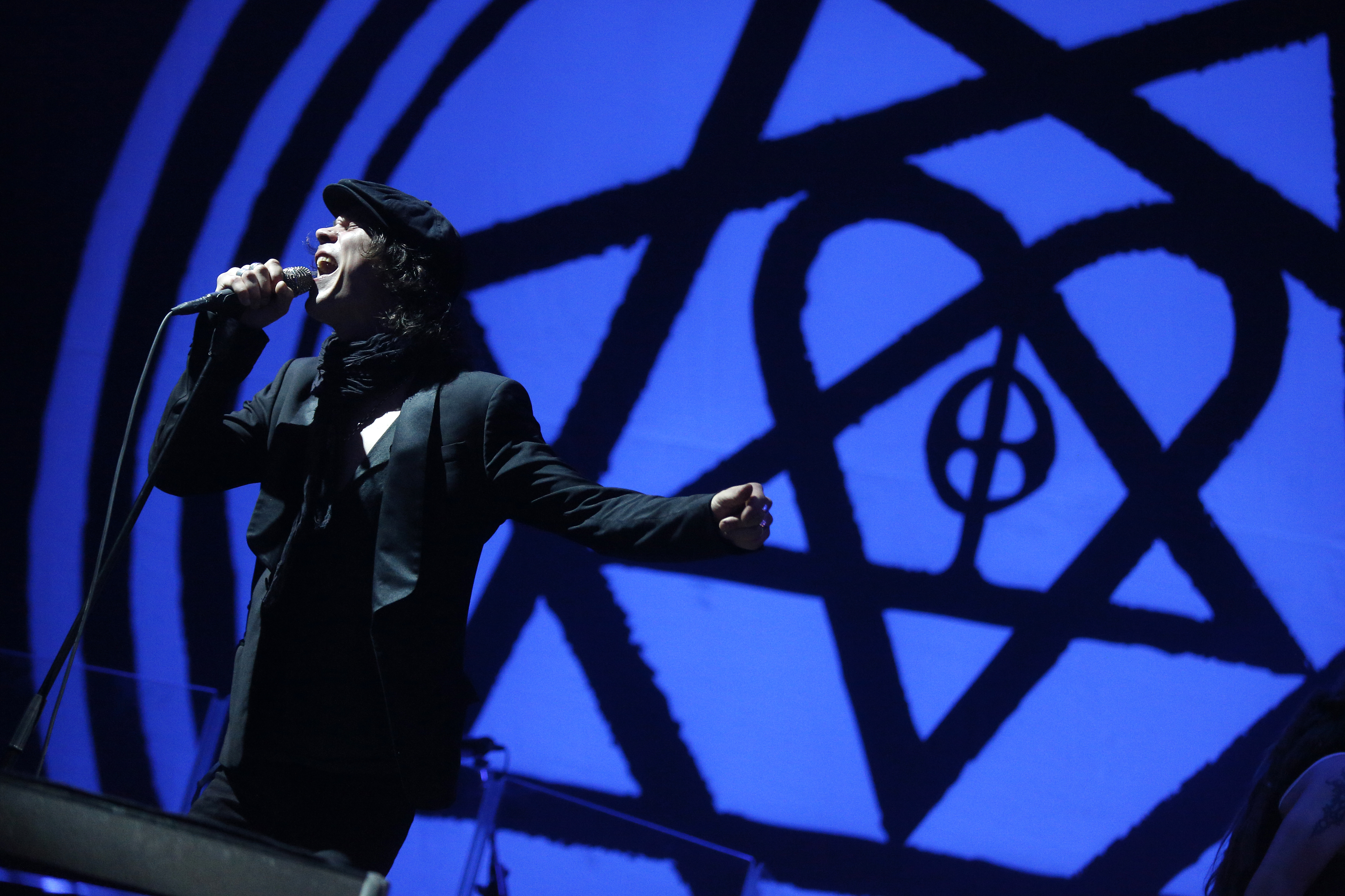 Ville Valo, Sänger und Gitarrist der Band HIM, steht beim Nova Rock-Festival 2013 auf der "Blue Stage"